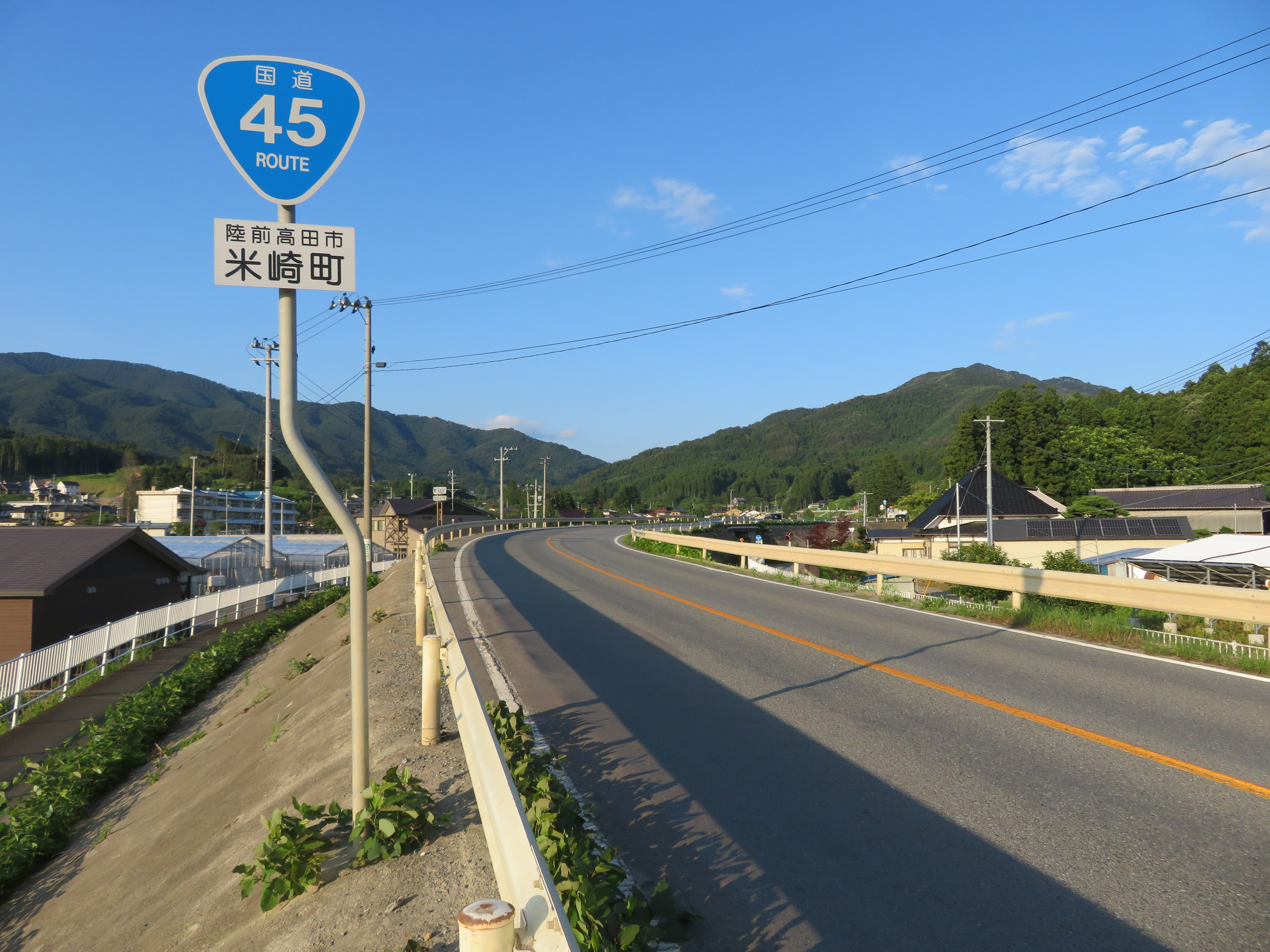 国道45号 陸前高田バイパス岩手県陸前高田市米崎町付近（大船渡方面を撮影）